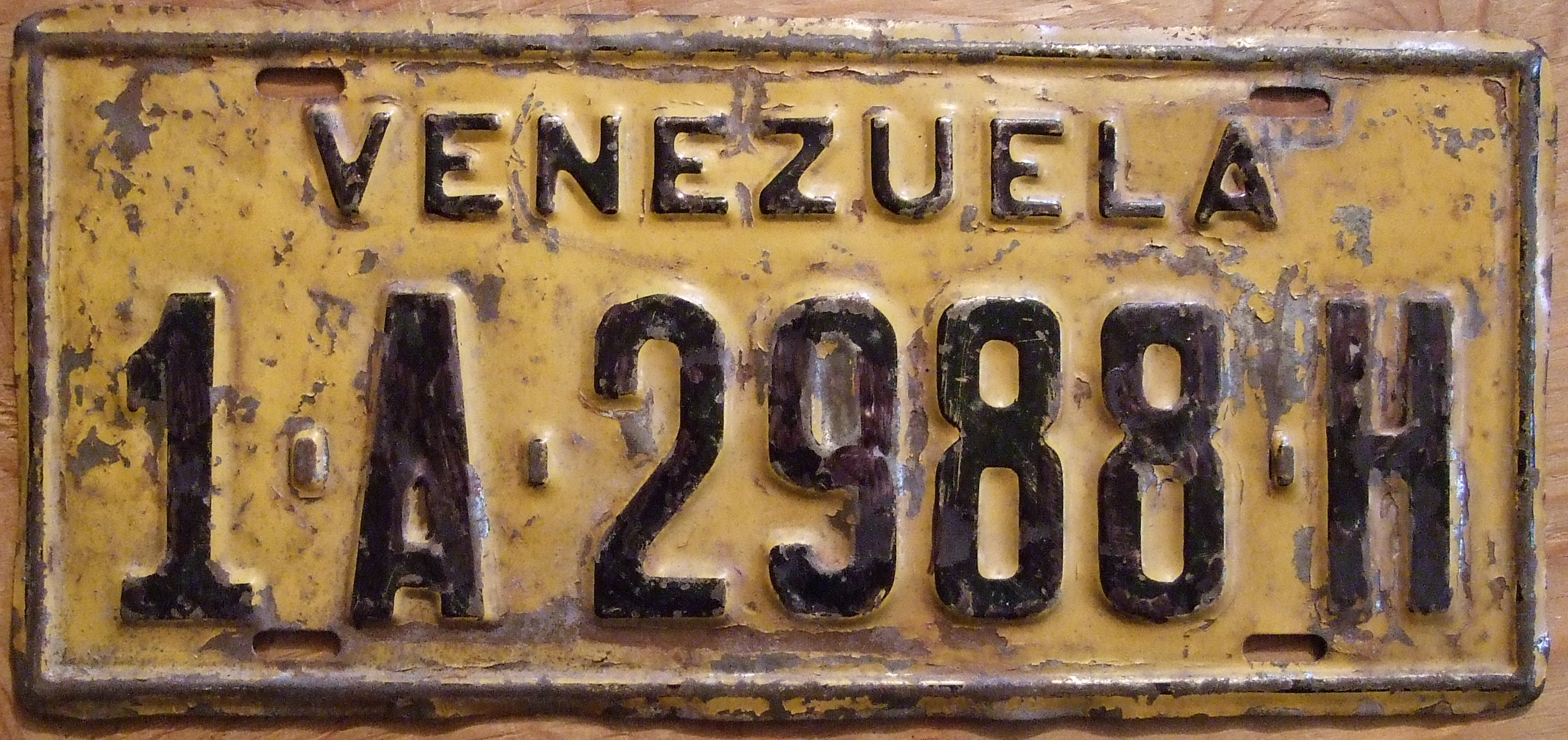 License plate of Venezuela